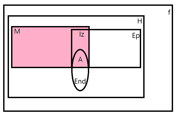 Relacje morfizmów